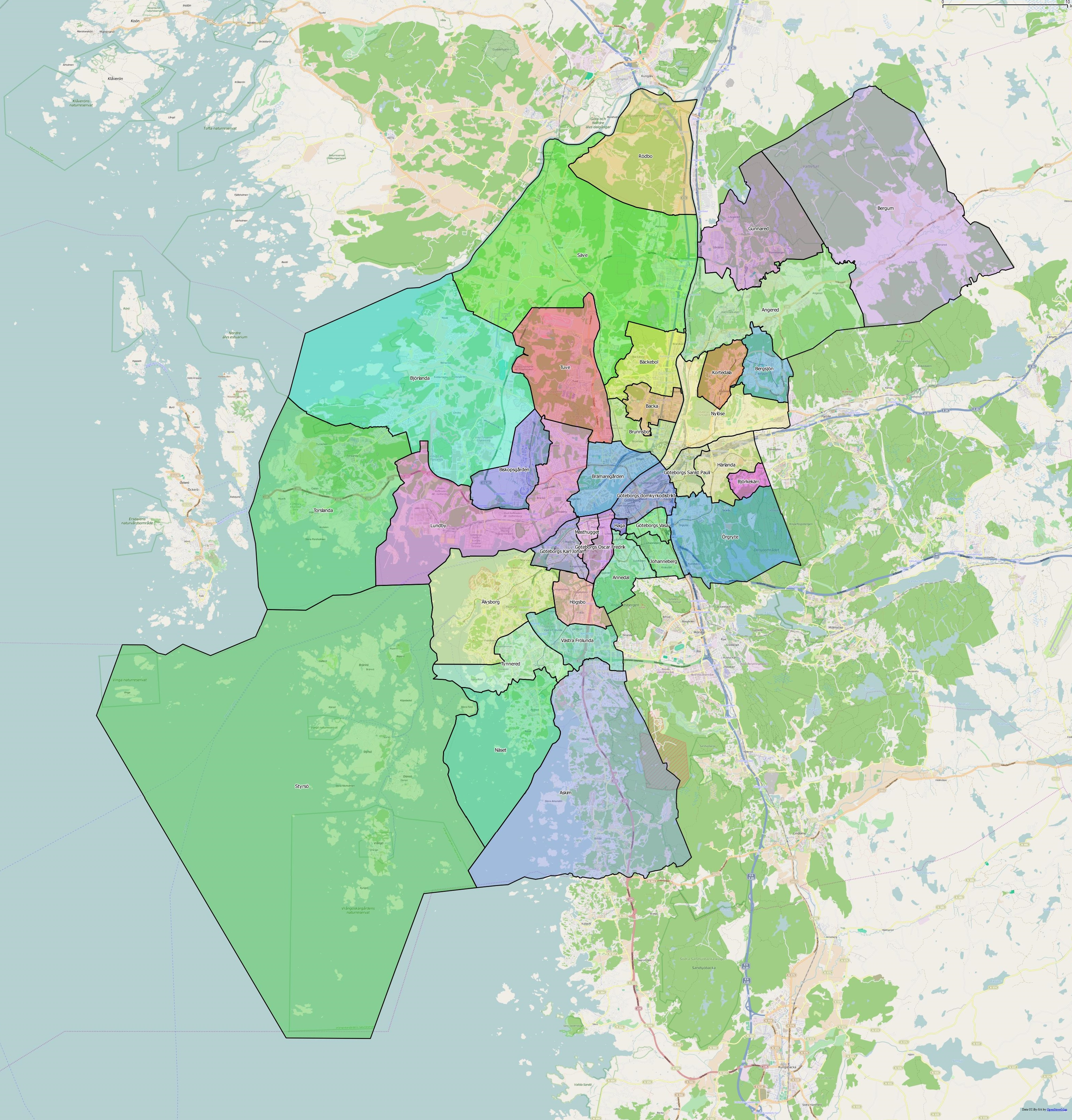 Distriktsindelningen i Göteborgs kommun